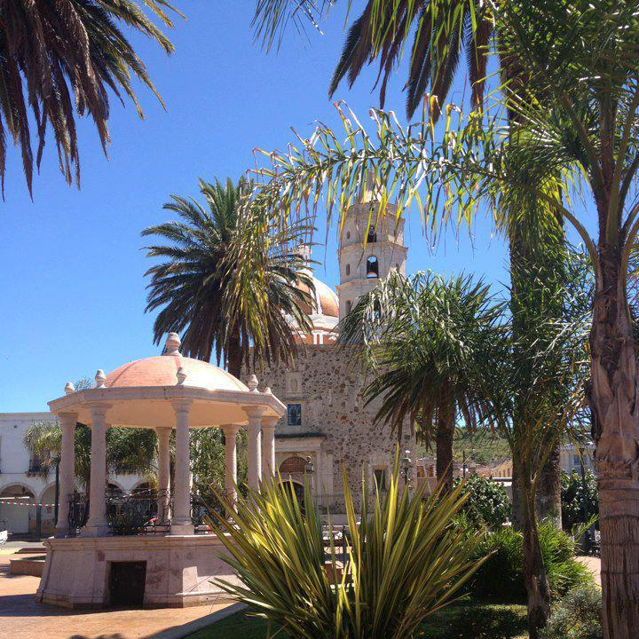 Jardín Principal